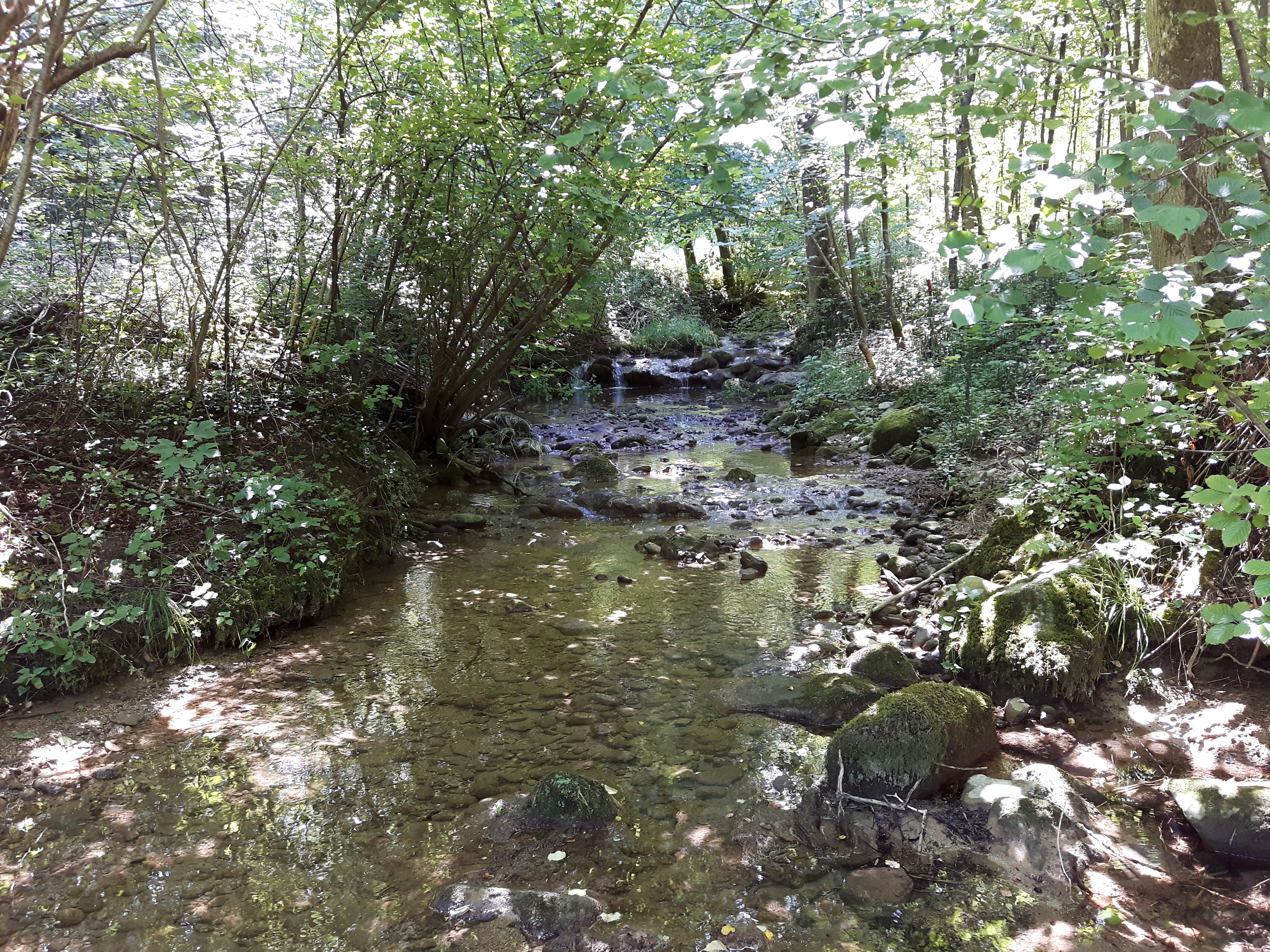 Der Aescherbach im Lochmatten Tobel unterhalb von Aesch in der Gemeinde Birmensdorf, Kanton Zürich